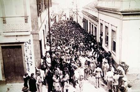 Sobrado em São João del-Rei, onde nasceu Tancredo Neves, situado na atual rua Artur Bernardes. A fotografia revela um flagrante das comemorações da Revolução de 30 na cidade.